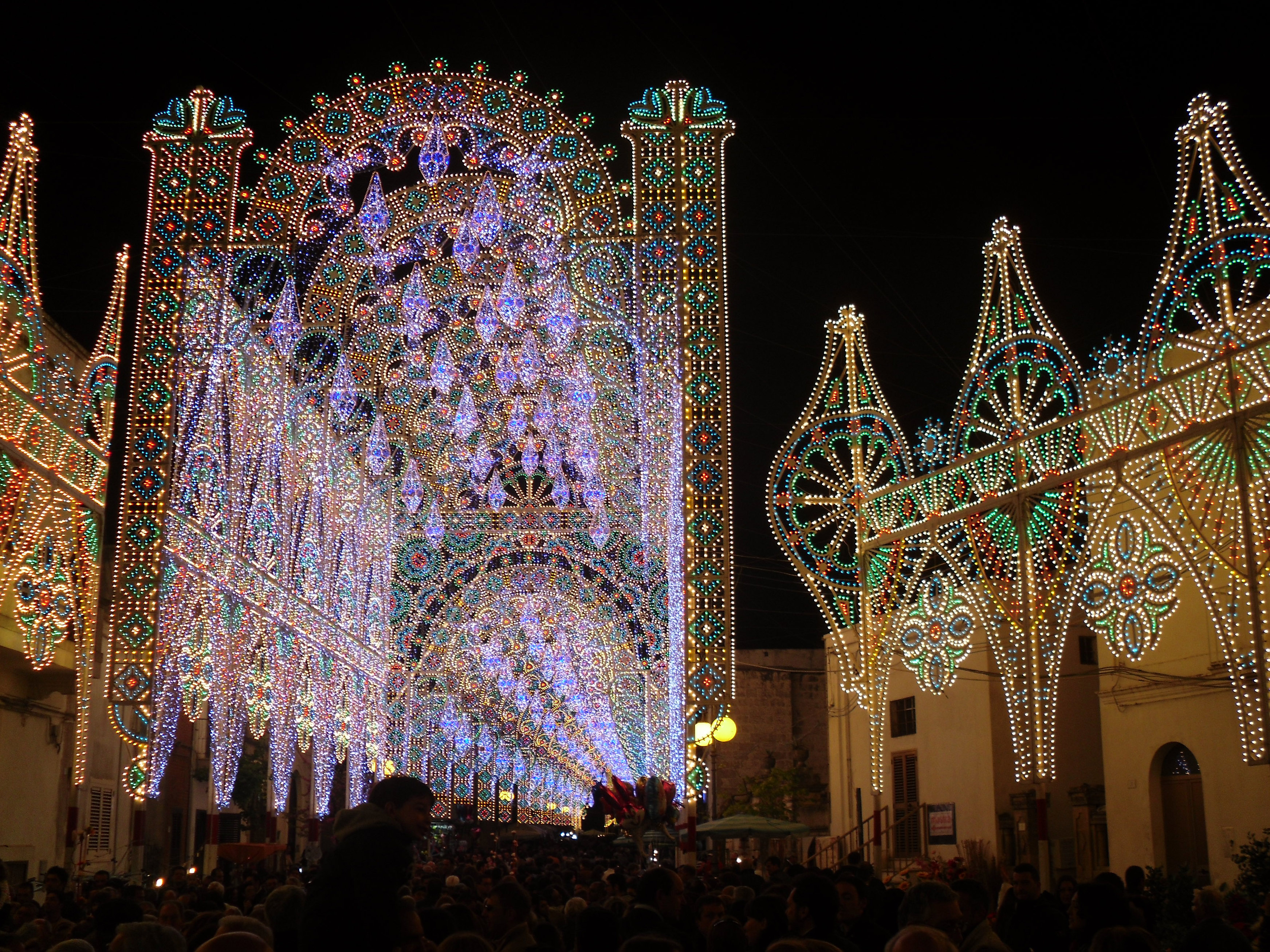 galleria di luminarie alla festa patronale di Diso (LE)